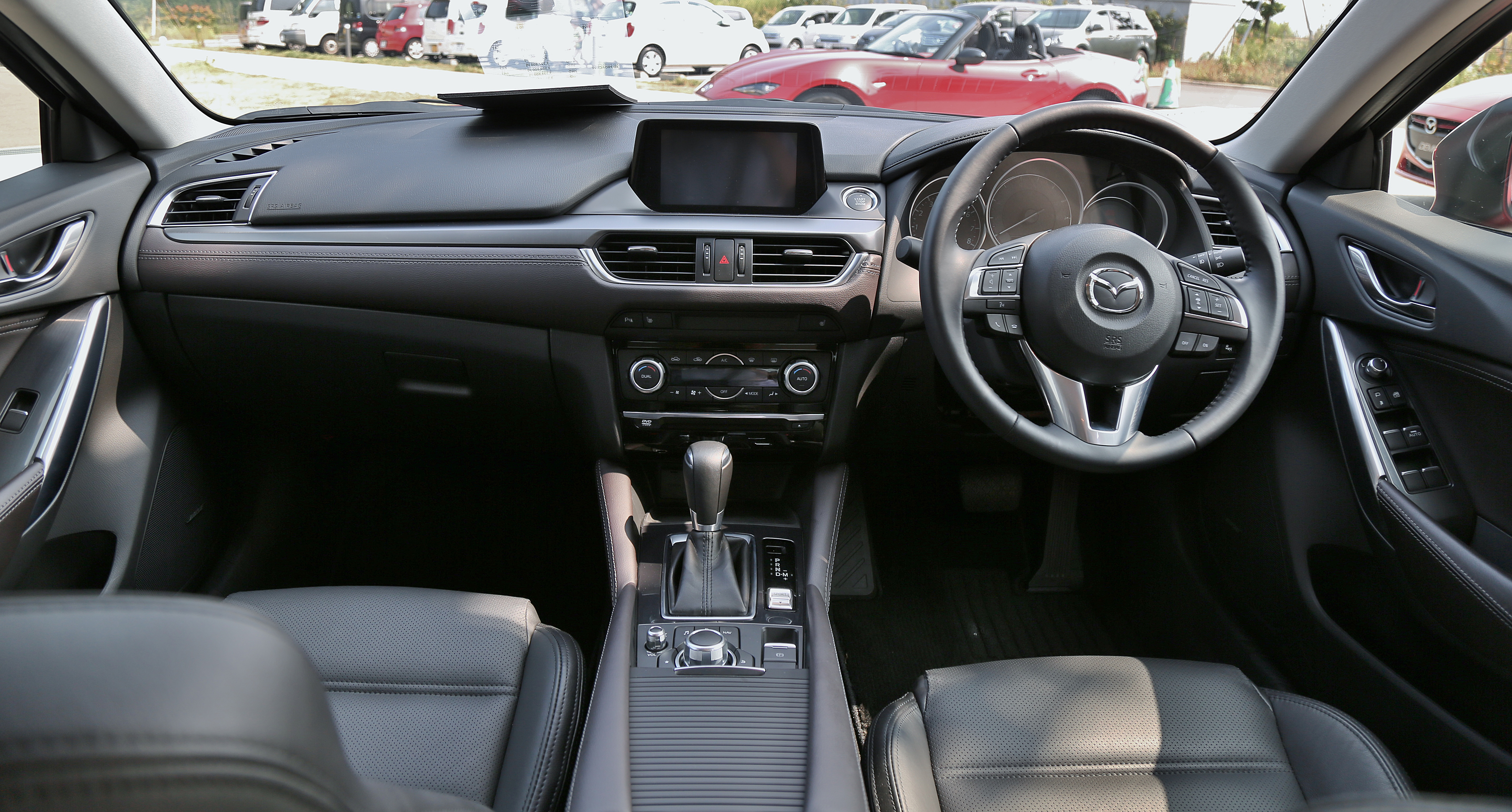 Mazda Atenza (GJ)